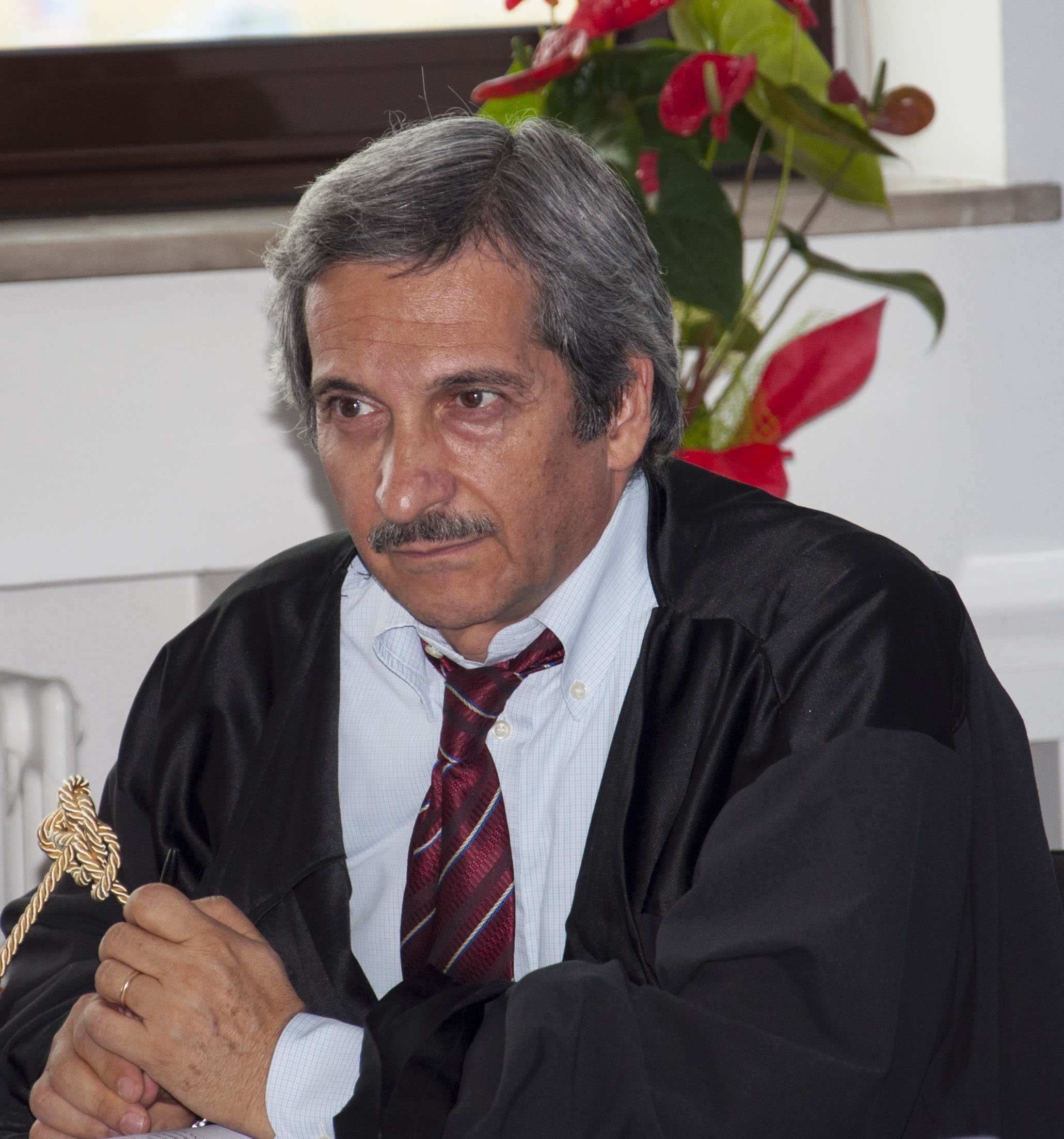 (Milano, 21 novembre 1954)